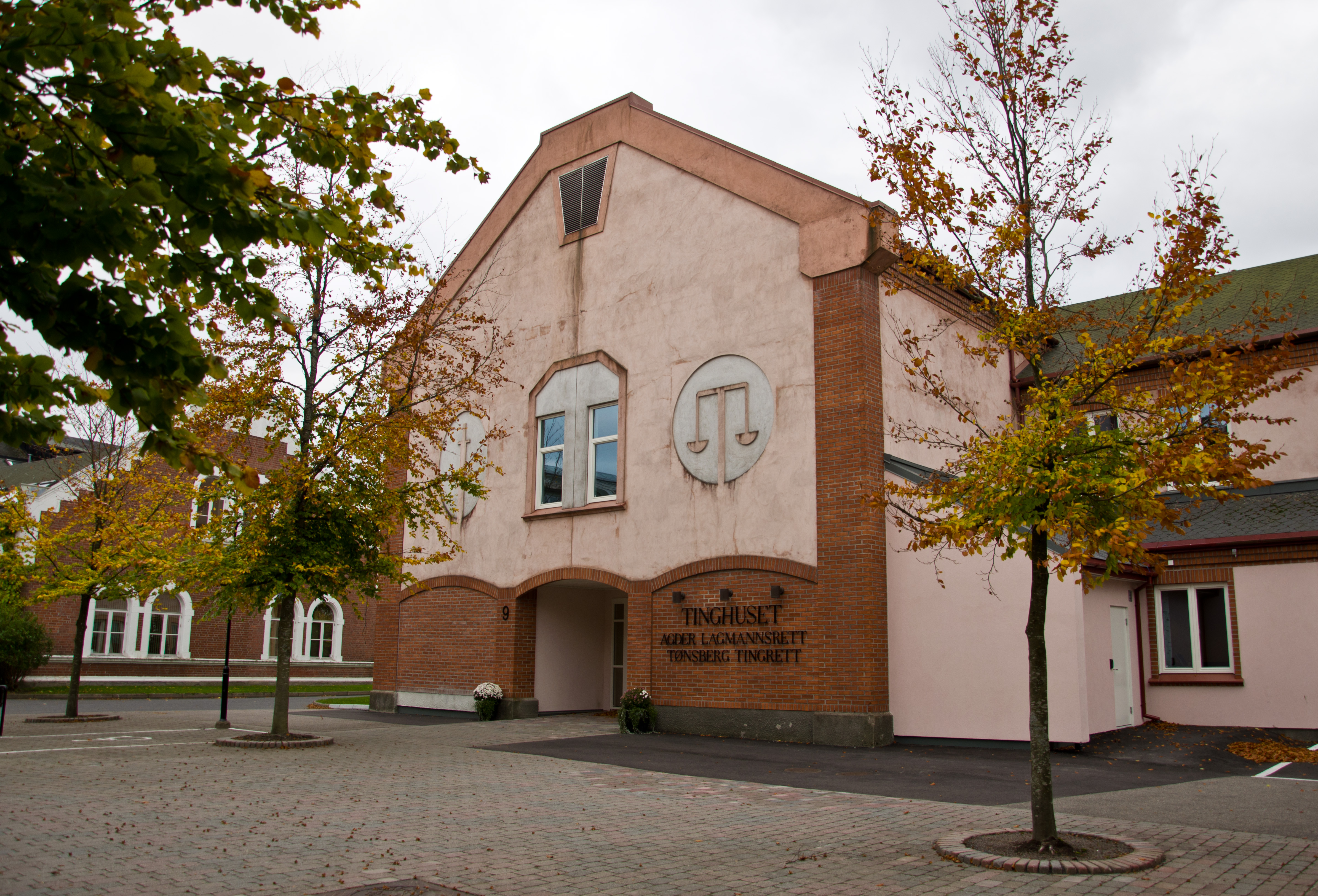 Tinghuset i Tønsberg huser Tønsberg tingrett.